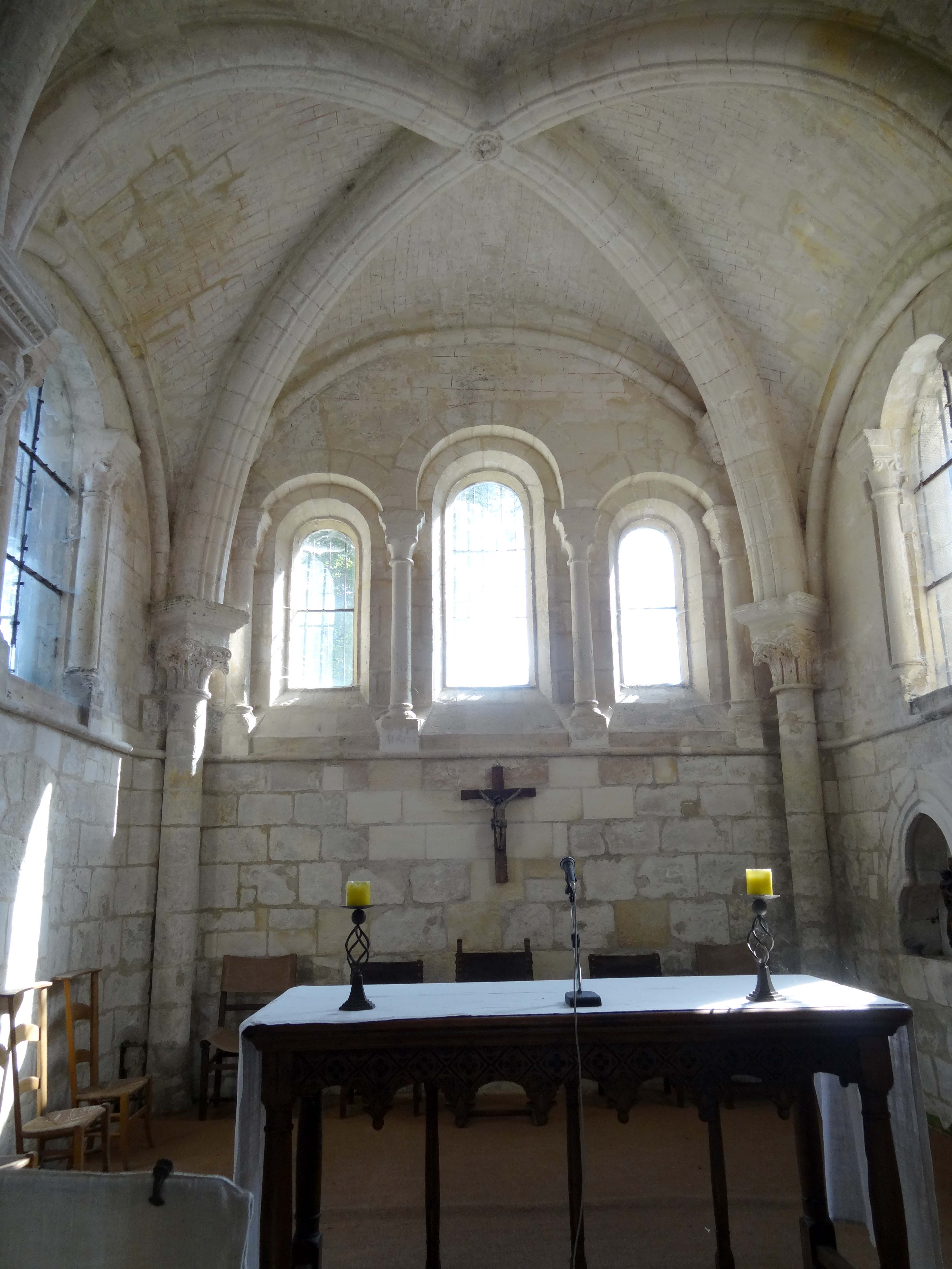 Intérieur de l'église - voir titre.